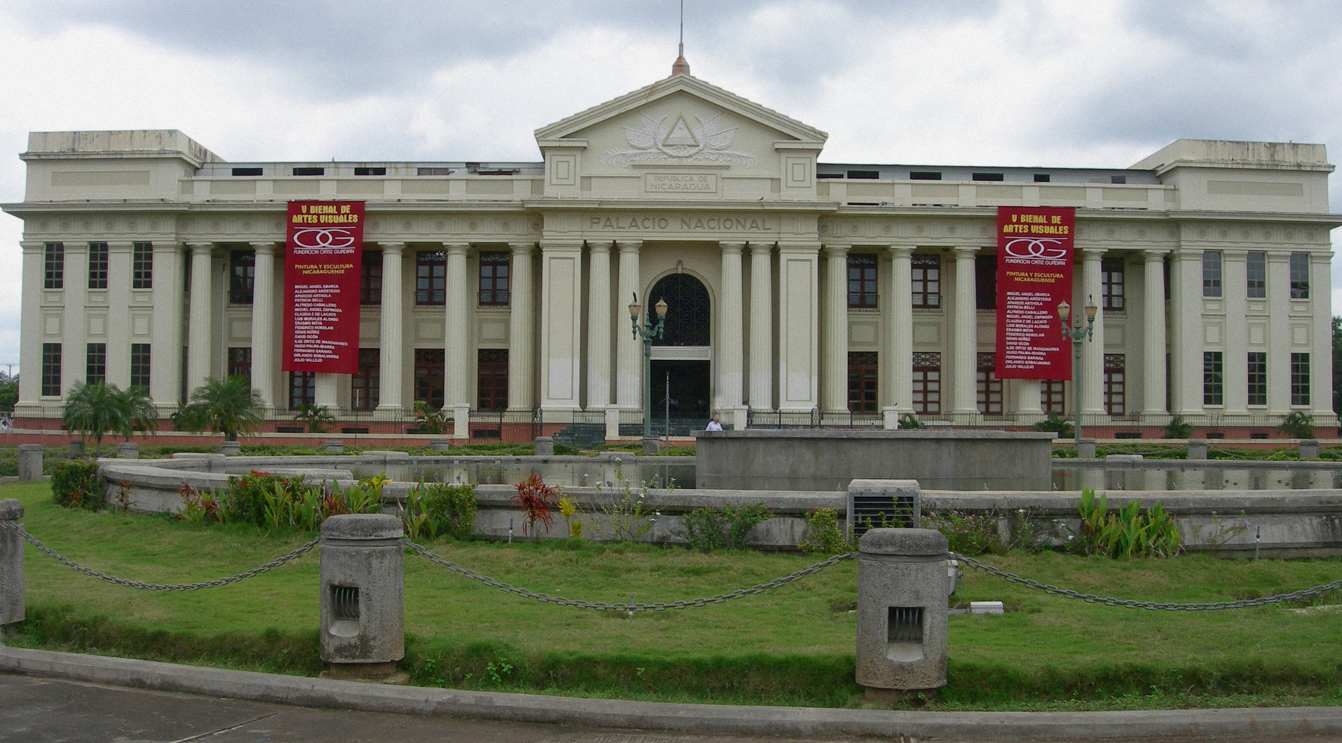 National Palace (Palacio Nacional) in Nicaragua.